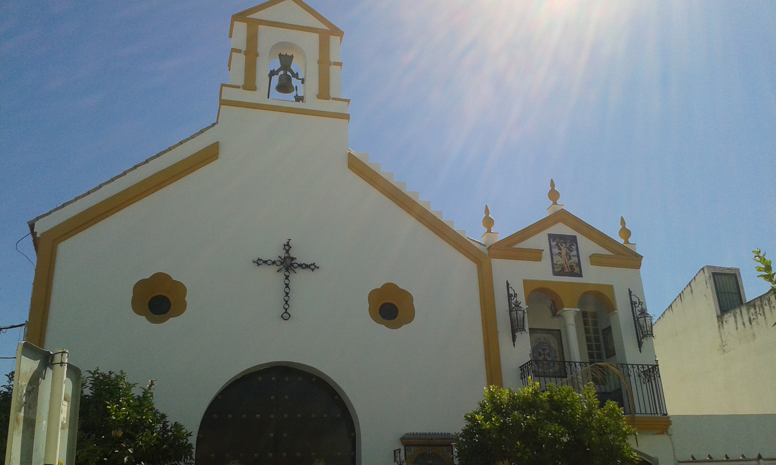 Capilla San Sebastian en Los Palacios y Villafranca